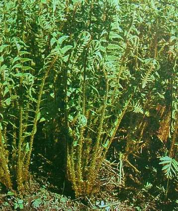 Щитовник мужской, весенние заросли, молодые листья